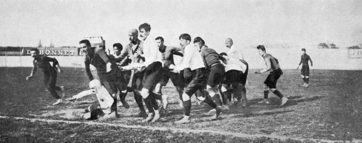 Le Stade bordelais (en blanc), champion de France en 1906 face au Stade français (le bordelais Mulot entrave le dribbling de Communeau et Jérôme).